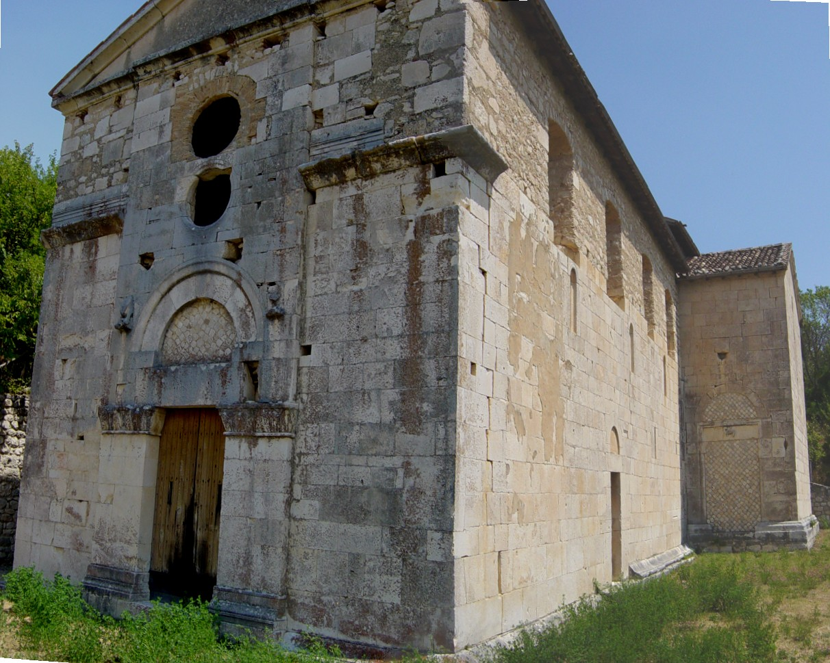 La chiesa di San Paolo di Peltuinum del comune di Prata d'Ansidonia in provincia dell'Aquila - Italia.